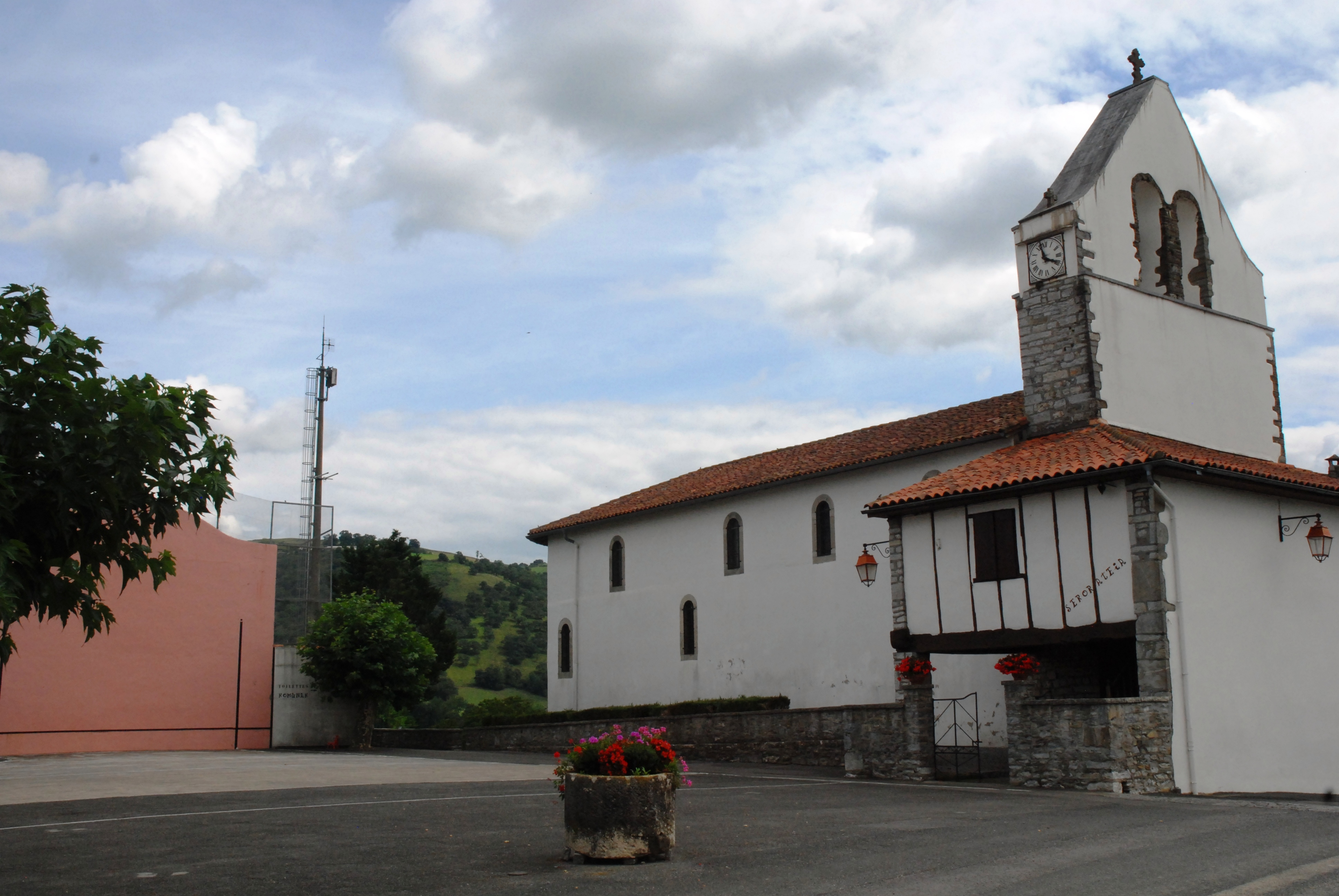 L'église Saint-Pierre et le fronton à Juxue